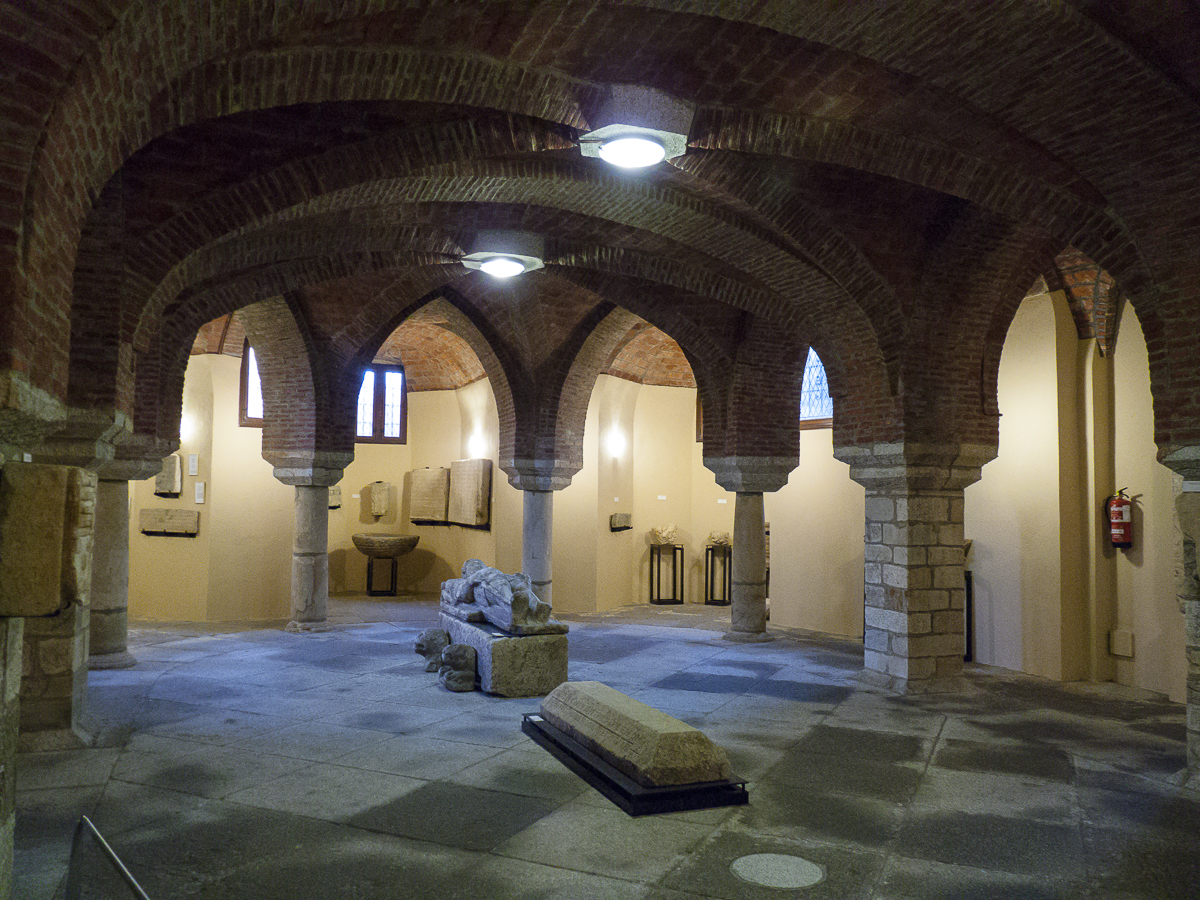 08082013 120134 ASTORGA 0092